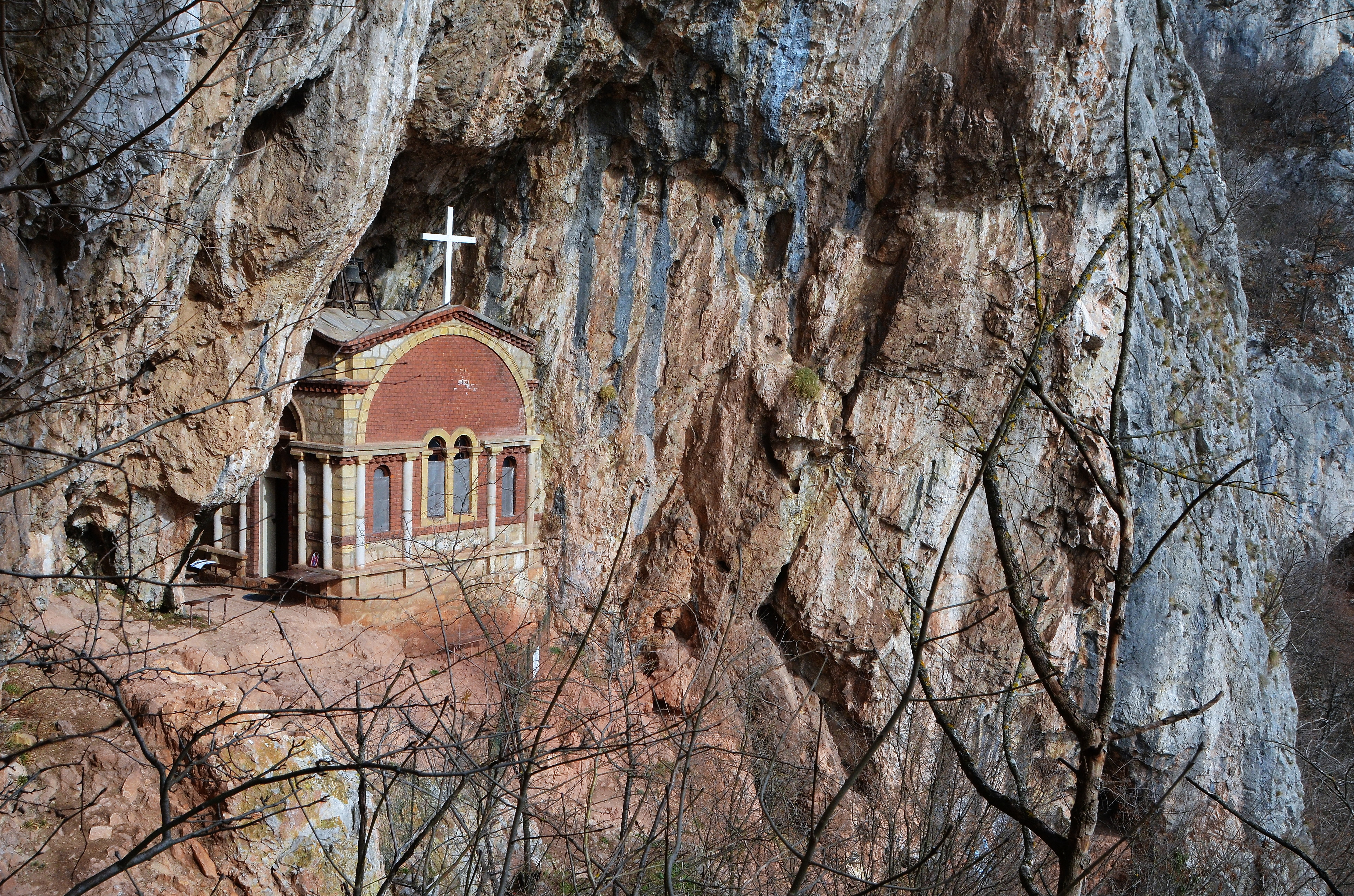 Капела је подигнута 1938. године на месту испосница у којима су у средњем веку живели монаси пустиножитељи.